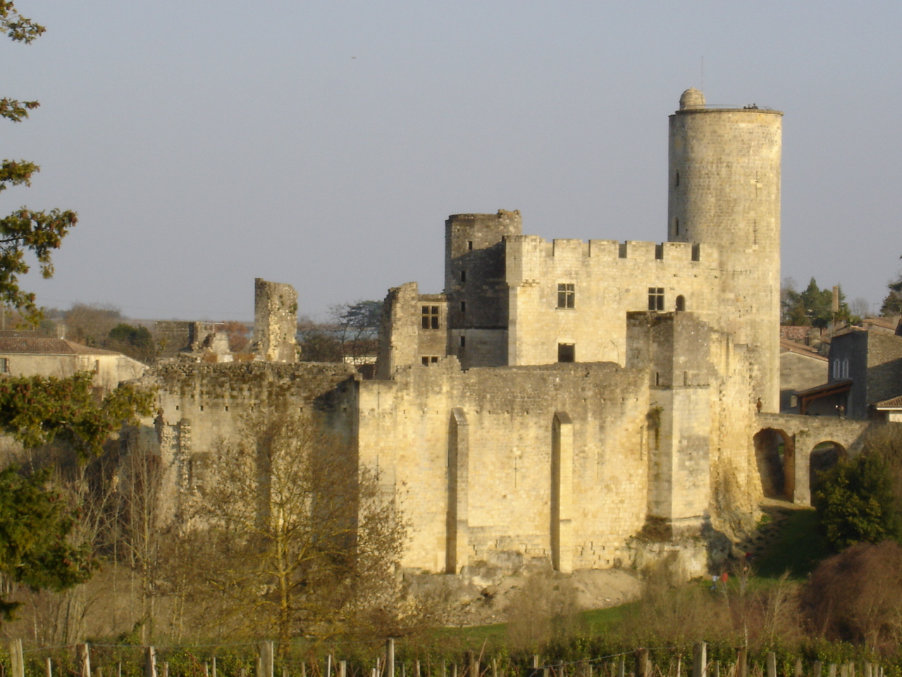 Château de Rauzan (33 Gironde France)